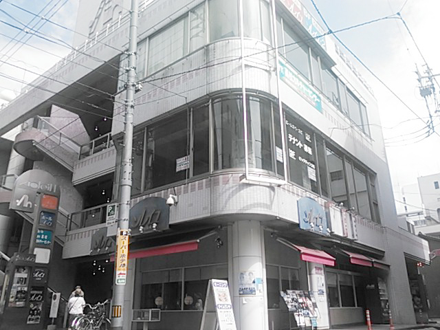 香川県高松市亀井町、ソレイユ第1ビル(ホールソレイユ・ソレイユ2)。南西側より撮影。